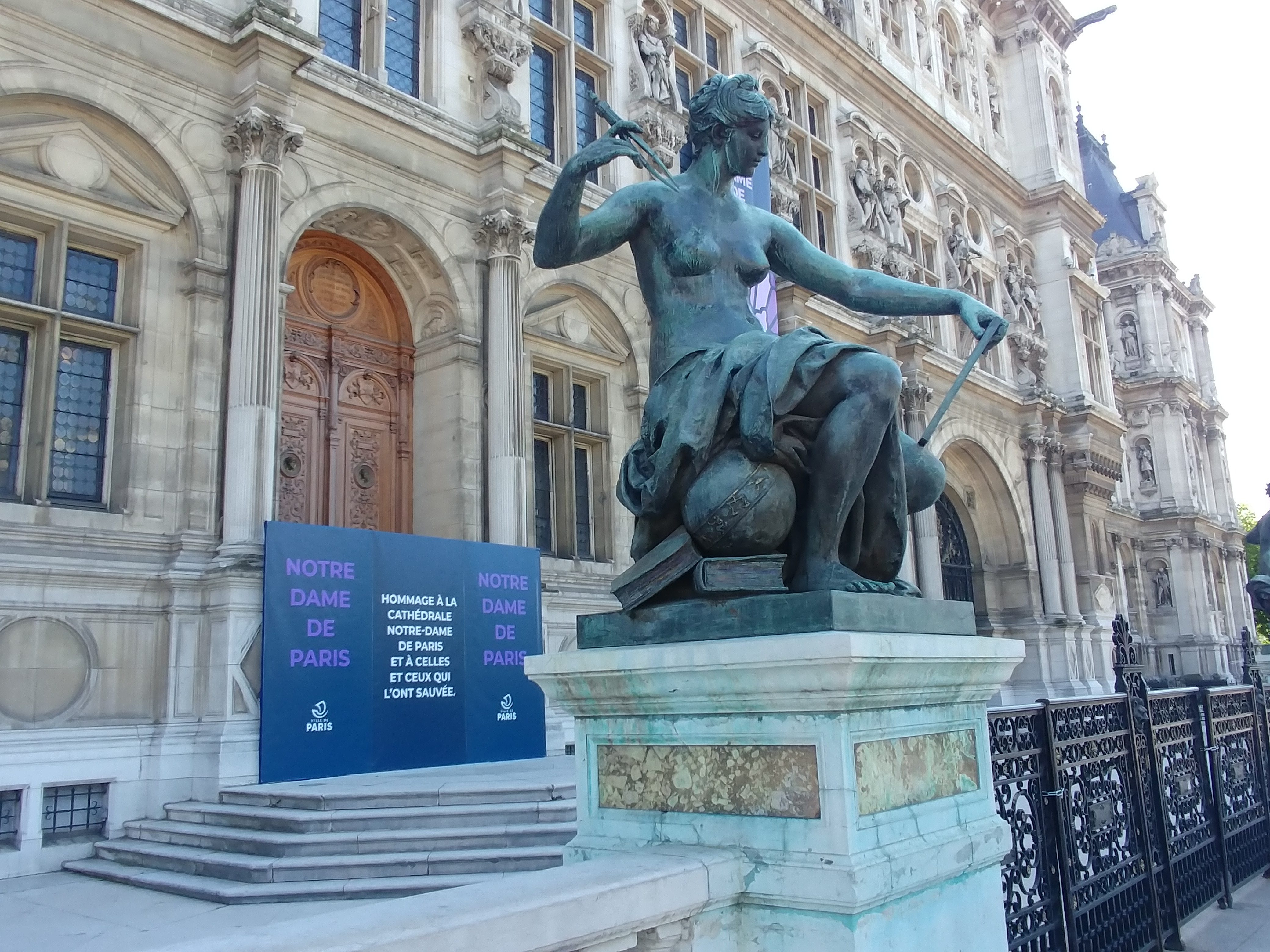 Plage rendant hommage aux sauveteurs de Notre Dame de Paris, présentée devant l'hôtel de Ville de Paris.